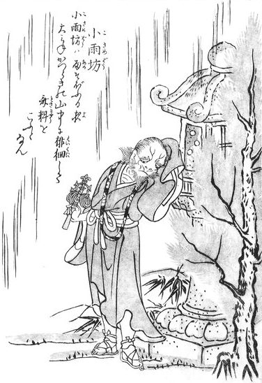 Kosamebō (小雨坊) from the Konjaku Hyakki Shūi (今昔百鬼拾遺)